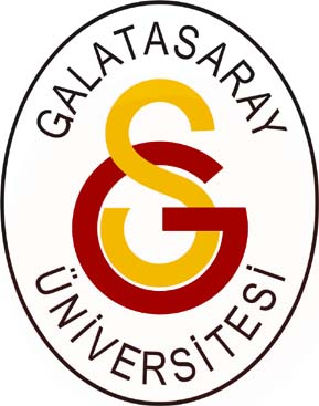 Logo Université Galatasaray